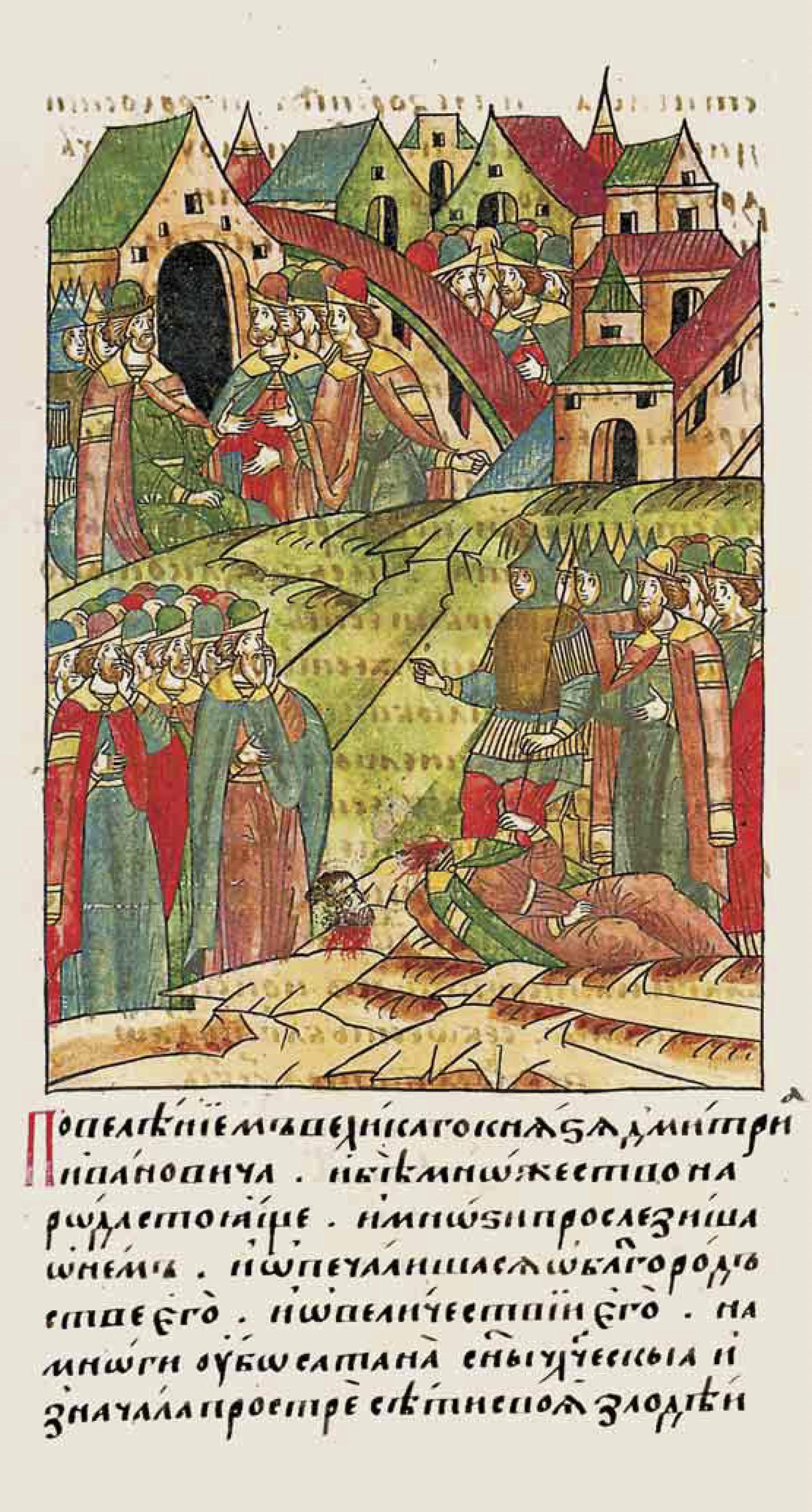 ЛИЦЕВОЙ ЛЕТОПИСНЫЙ СВОД [Тем же летом пошел из Орды Иван Васильевич, тысяцкий, и, обольстив его и перехитрив, схватили его в Серпухове и привели его на Москву. И месяца августа в 30-й день, на память святого мученика Филикса, во вторник до обеда, в 4-й час дня, убит был Иван Васильевич, тысяцкий, мечом посечен был на Кучкове поле у города Москвы] повелением великого князя Дмитрия Ивановича. И было множество народа стоящего, и многие прослезились о нем, и опечалились о благородстве его и о величестве его. Ибо на многих сынов человеческих сатана изначала простер сети свои злодейственные: [и высокомерие, и гордость, и неправду вселил в них, и научил их друг на друга враждовать и завидовать, и властям не покоряться. Ибо глаголет Апостол: «Никтоже о себе честь приемлет, но званный от Бога», и «В неже, кто зван бысть, в том да пребывает », и «Вси убо, и владущии, и послушнии, и господьствующии, и рабъствующии во смирении и в любви да пребывают. Весь бо закон во смирении и в любви есть» и «Любовь покрывает множество грехов», и «Пребываяй в любви, в Бозе пребывает, а Бог в нем пребывает, понеже Бог любовь есть», «Темже, рече, друг друга любите, Бога бойтеся, царя чтите; раби, повинуйтеся во всяком страсе владыкам, но токмо благим и кротким, но и строптивым. Се бо есть благодать, да о всем славится Христос Бог, Ему же слава во веки веков. Аминь».]